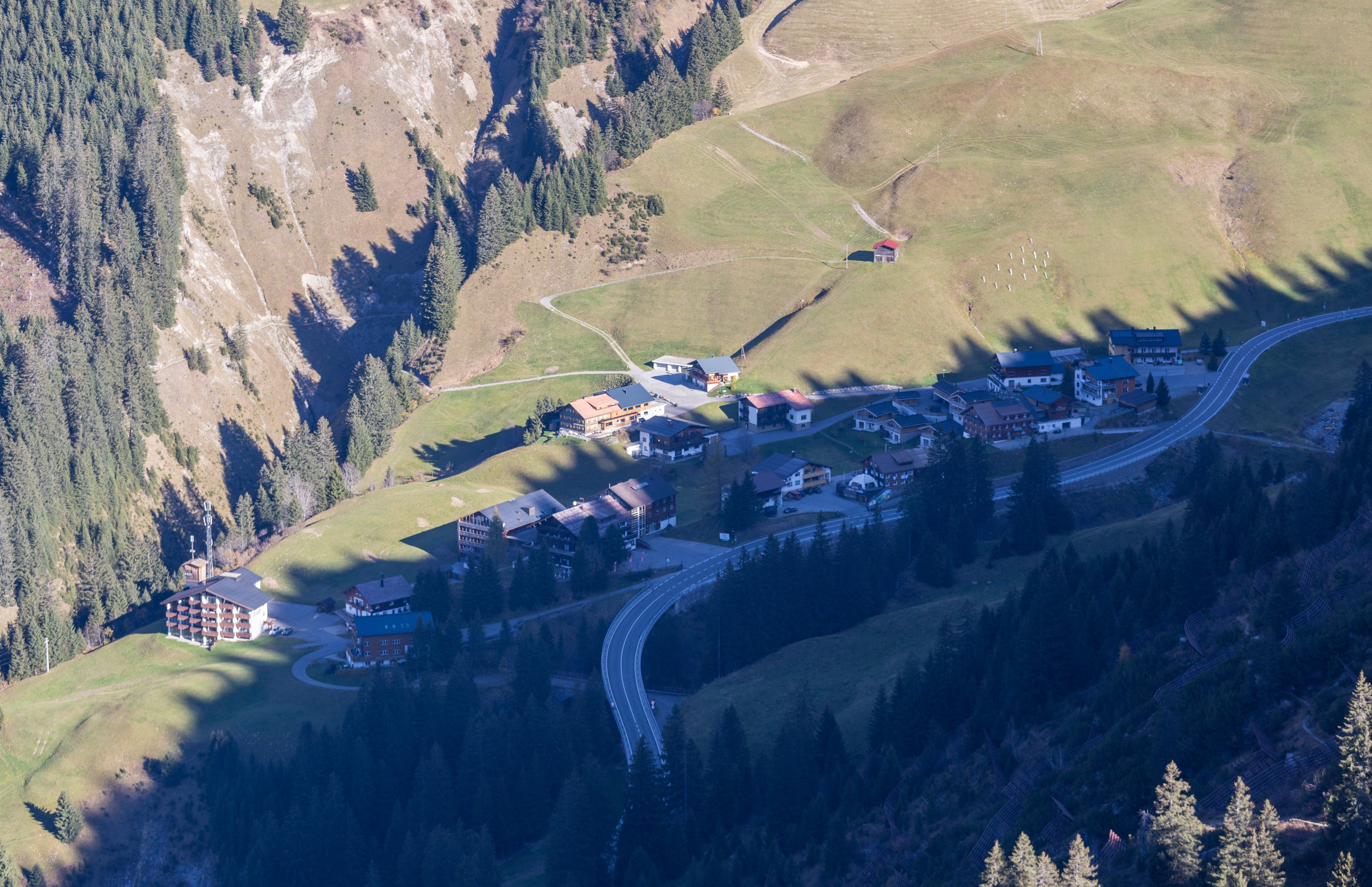 Luftbild des Ortsteils Neßlegg der österreichischen Gemeinde Schröcken, gesehen von Süden.